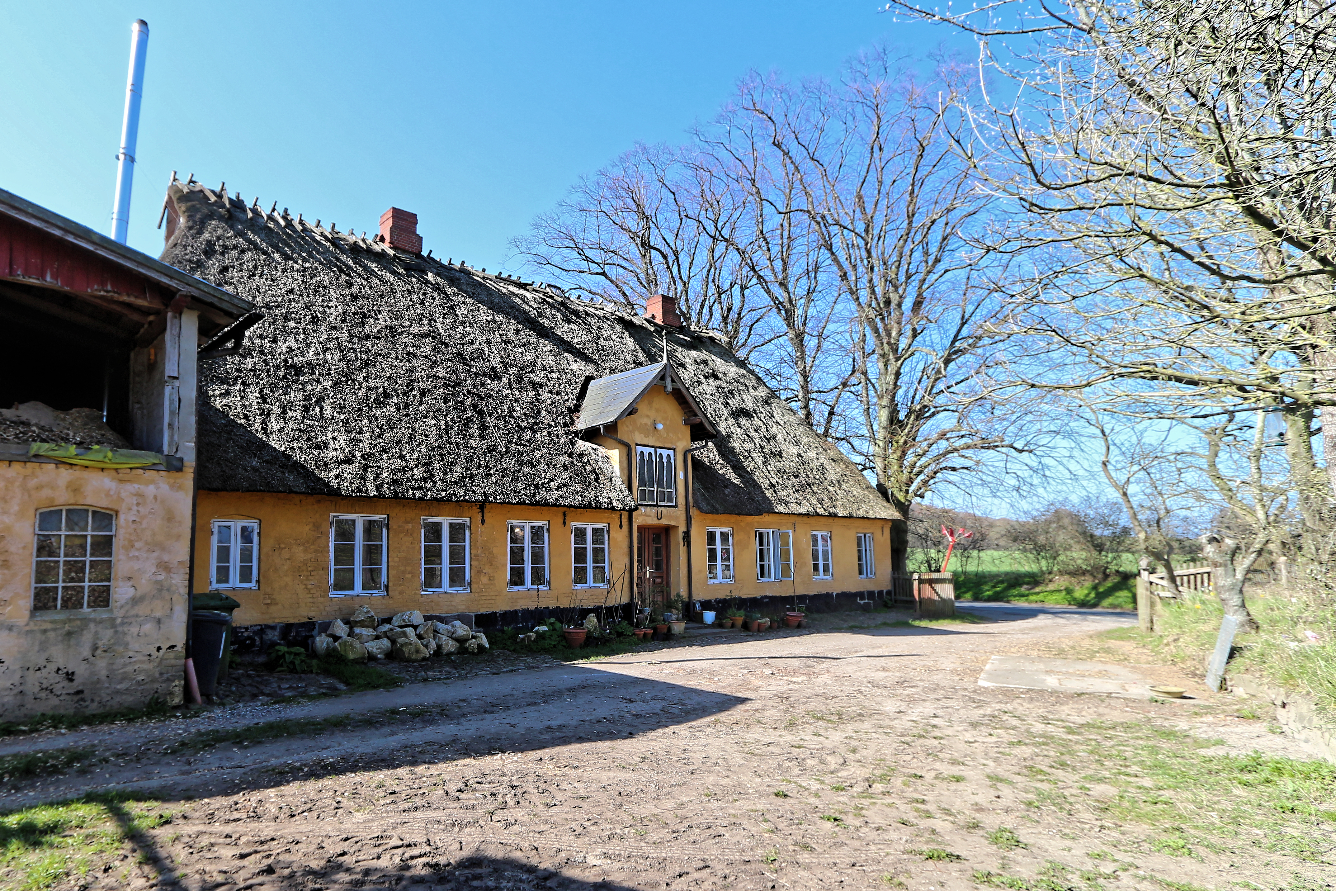 Munkbrarup Balm 1, ehemaliges Armenhaus